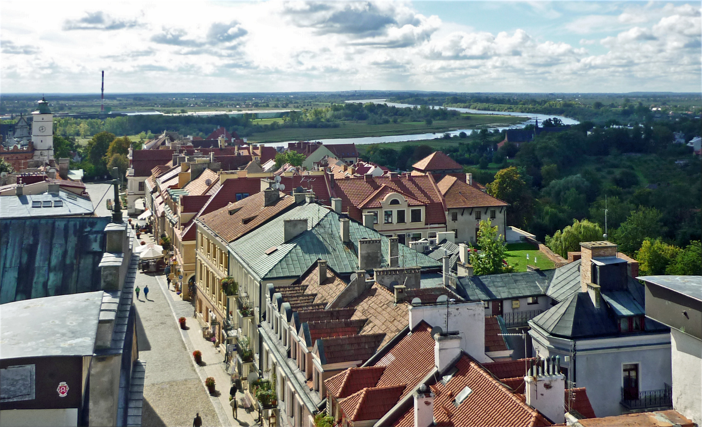 Blick auf Sandomierz vom Opatower Tor